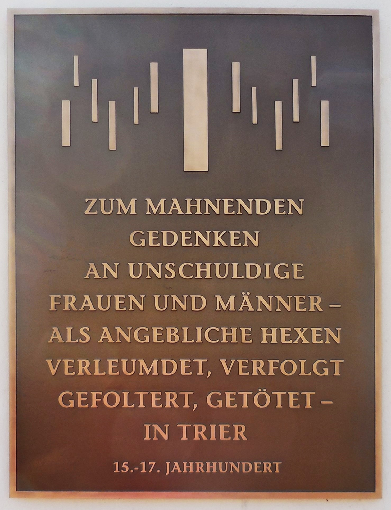 Gedenktafel in Trier für Opfer der Hexenprozesse vor der Porta Nigra an der Fassade des Stadtmuseums Simeonstift. 2015 Inschrift der Gedenktafel: "Zum mahnenden Gedenken an unschuldige Frauen und Männer - als angebliche Hexen verleumdet, verfolgt, gefoltert, getötet - in Trier. 15. - 17.Jahrhundert."